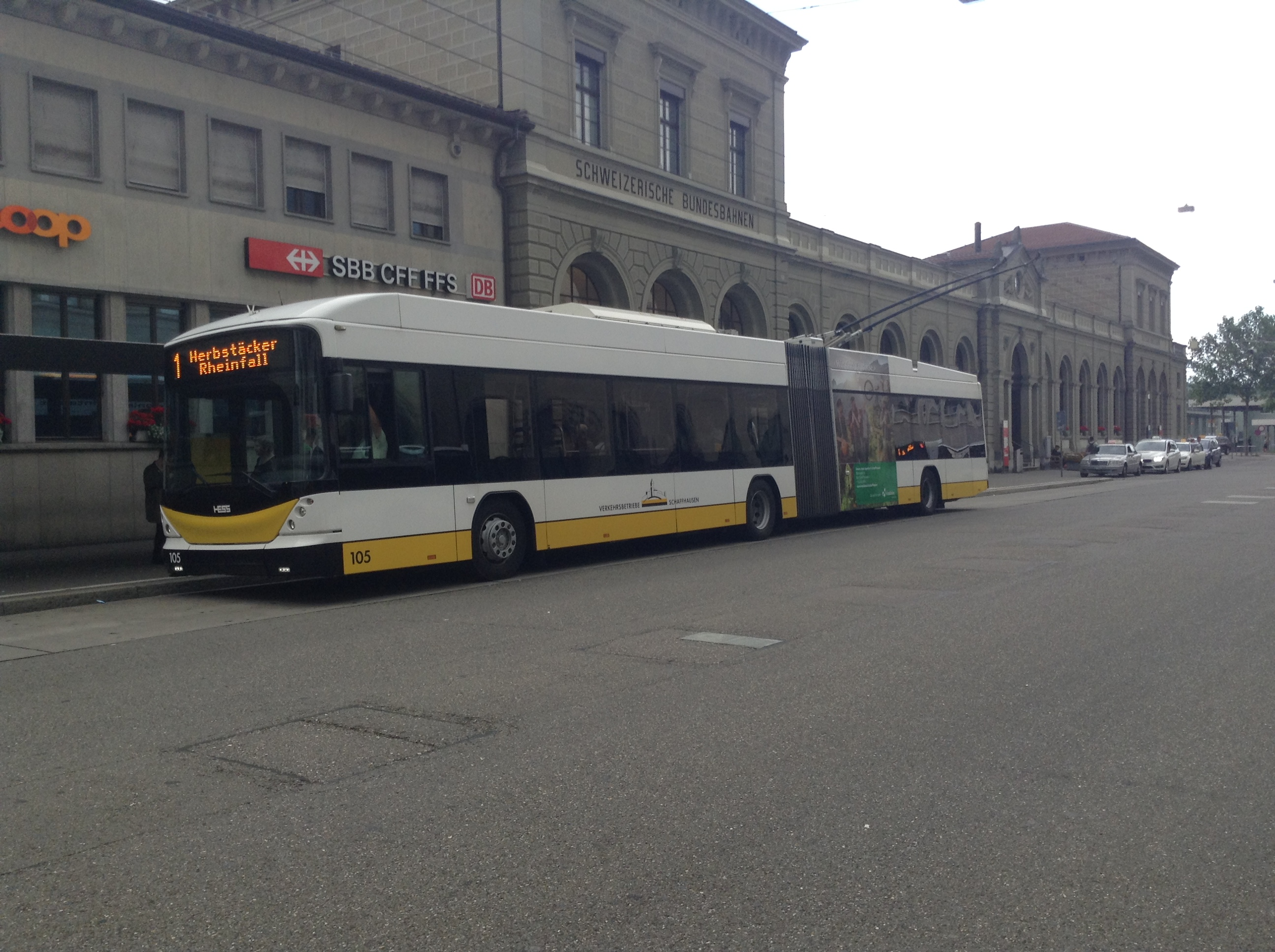 Ein Swistrolley 3 der VBSH